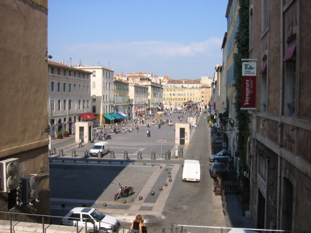 Le Cours Honoré-d'Estienne-d'Orves à Marseille, France.